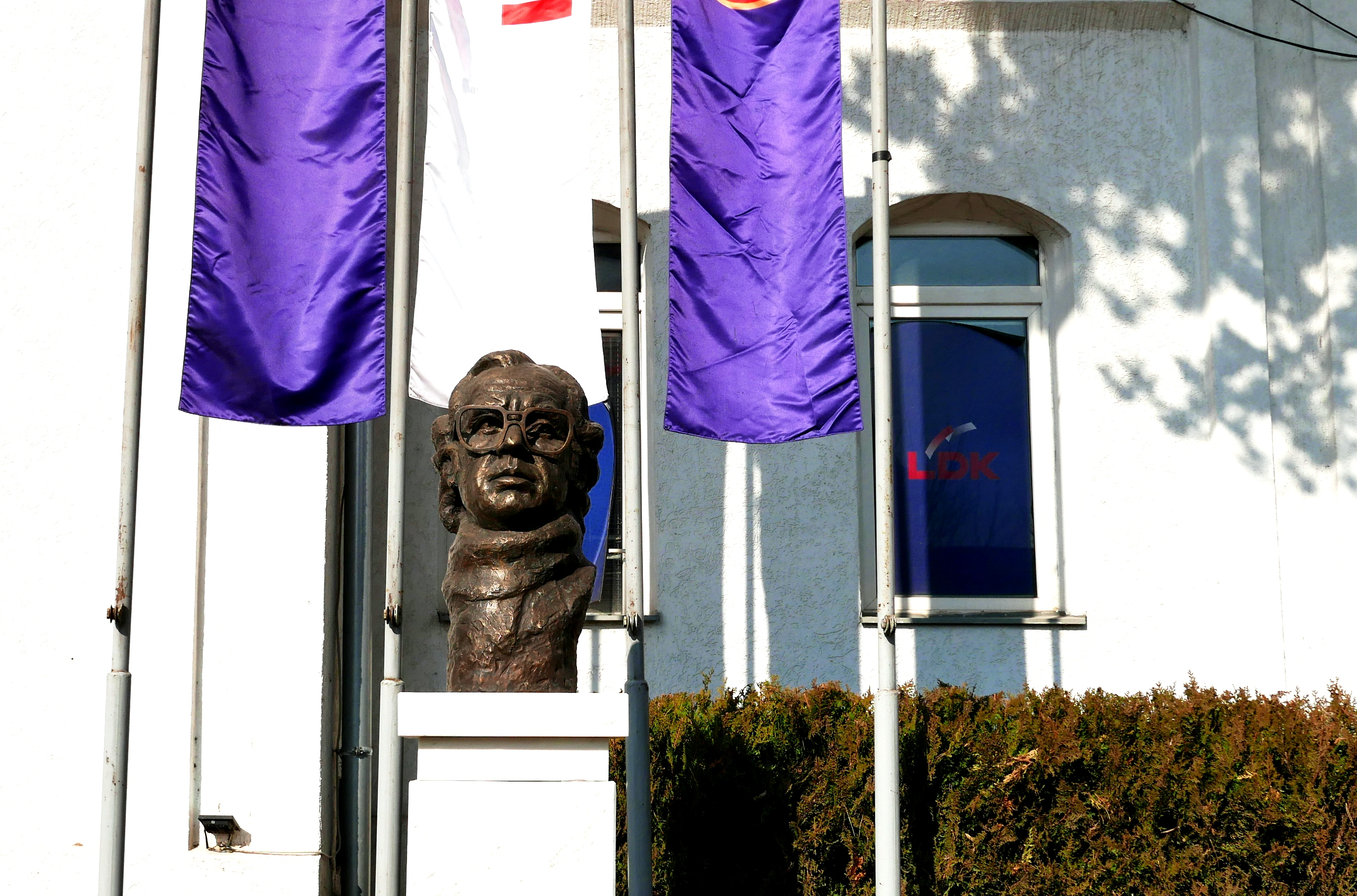 Busti i Dr Ibrahim Rugoves, pran selisë së LDK në Gjilan